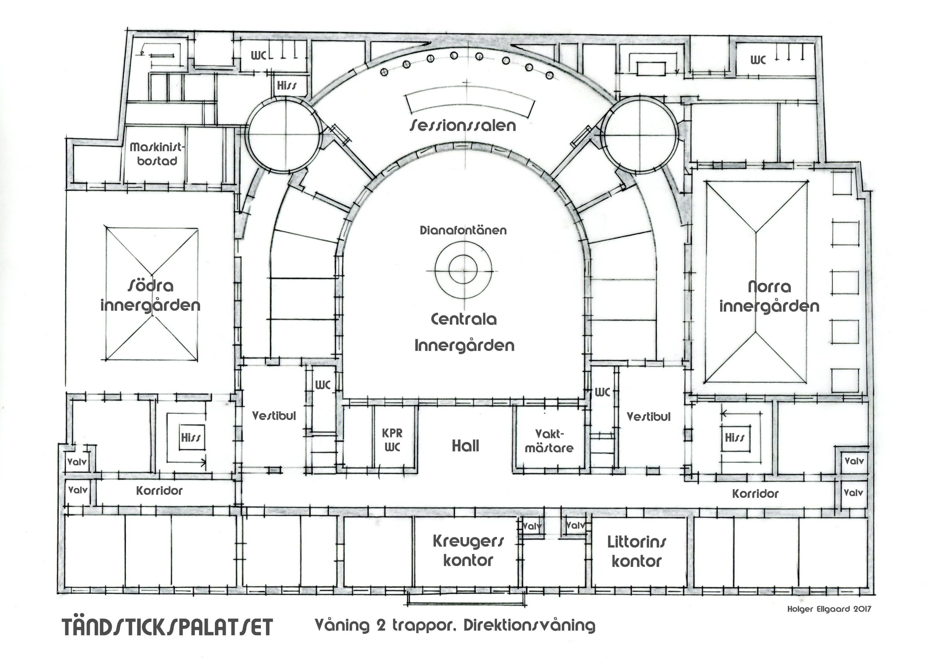 Tändstickspalatset planritning vån 2 tr (Direktionsvåningen) Källa: Stockholms stadsbyggnadskontors ritningsarkiv, Spektern 8